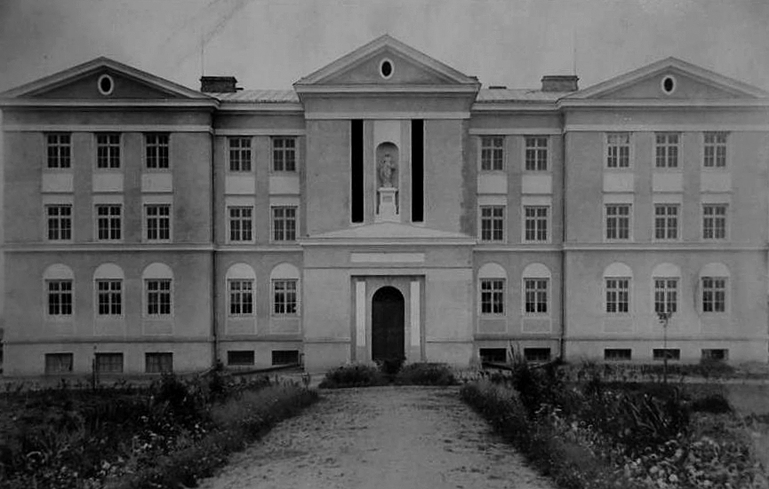 Луцьк. Сиротинець святої Терези сестер бенедиктинок.